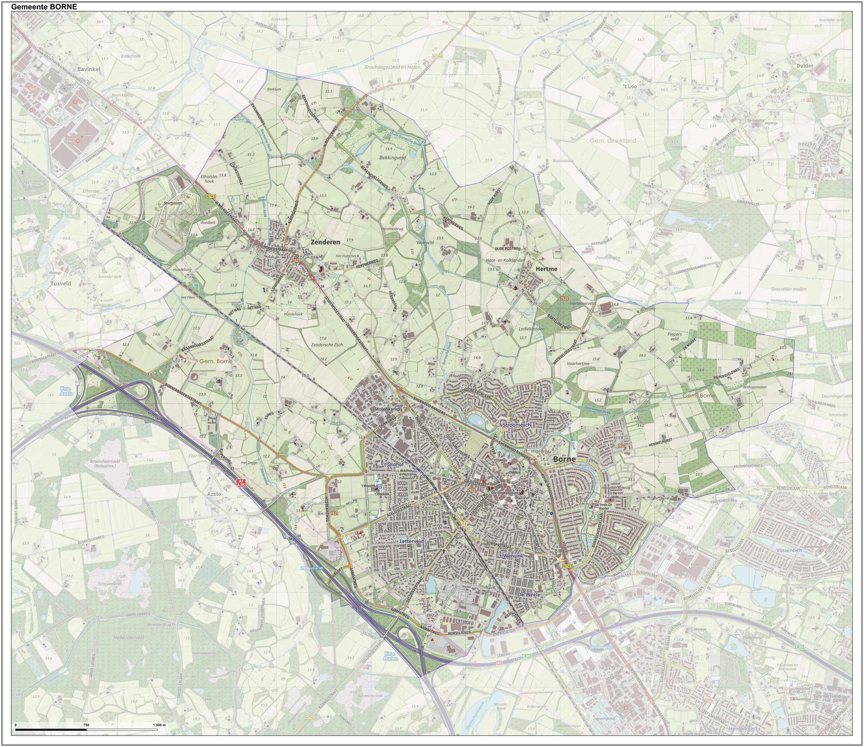 Topografische gemeentekaart. Resolutie: 400 pixels/km. Kaartbeeld samengesteld uit de open geodata van de Top10NL en Top25namen (Kadaster), Creative Commons-BY licentie. Gebouwvlakken uit open geodata BAG extract. Wegen uit de OpenStreetMap, OpenStreetMap community. Reliëfschaduw uit de Actuele Hoogtekaart AHN2. Samenstelling en kleurenschema: Jan-Willem van Aalst, met QGIS. Zie ook de Legenda.